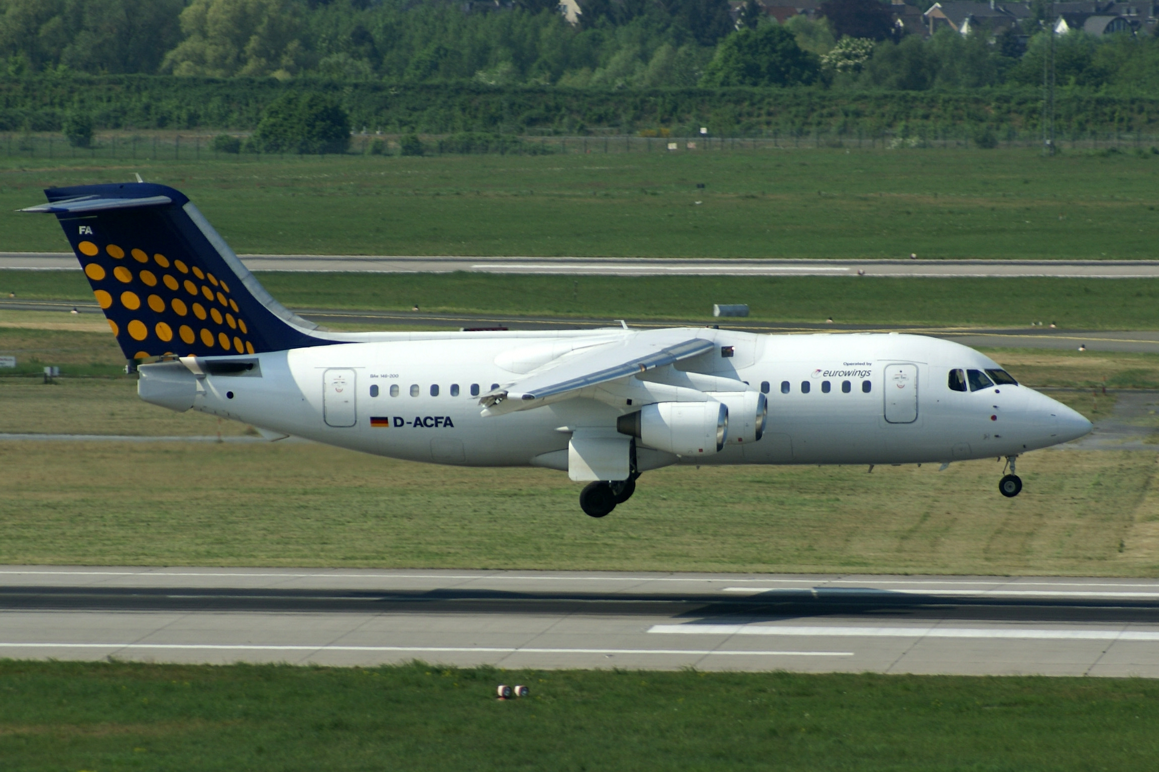 MSN 2200 BAE 146-200 EUROWINGS DUS EX CONTI FLUG STORED IN 04/2010